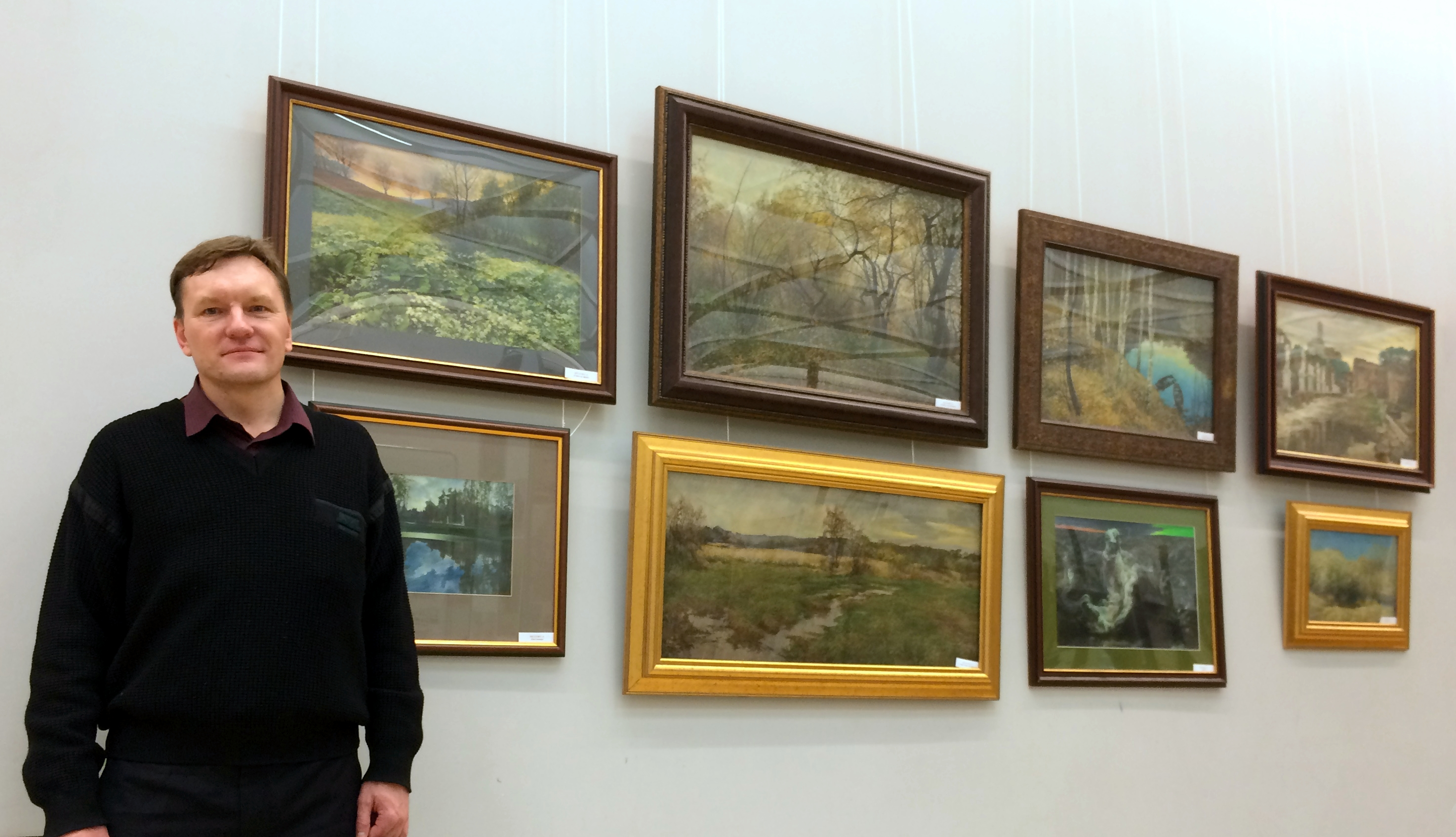 Евгений Алексеевич Богатов. Художник и доцент МАРХИ